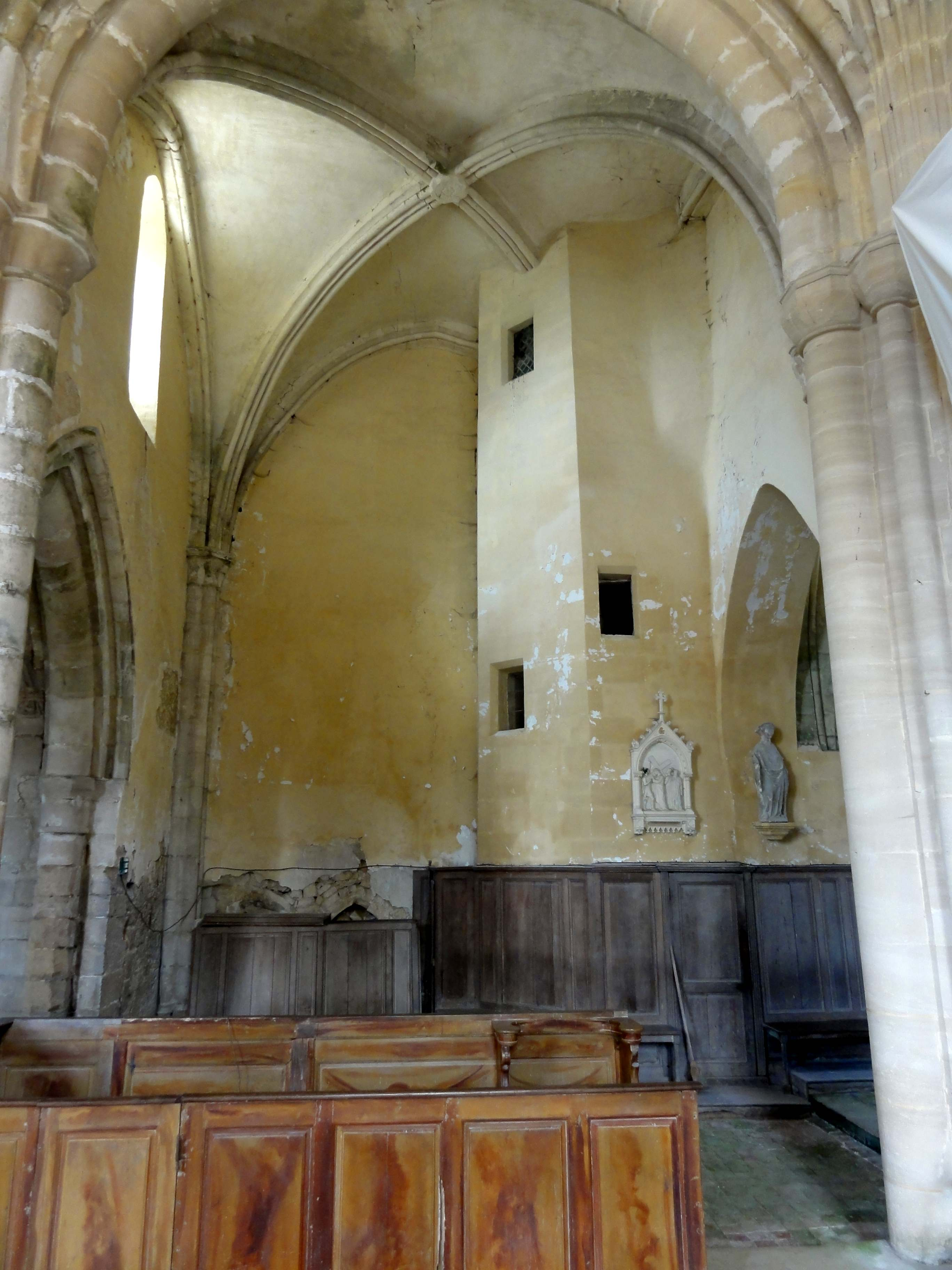 Intérieur de l'église - voir le titre du fichier.